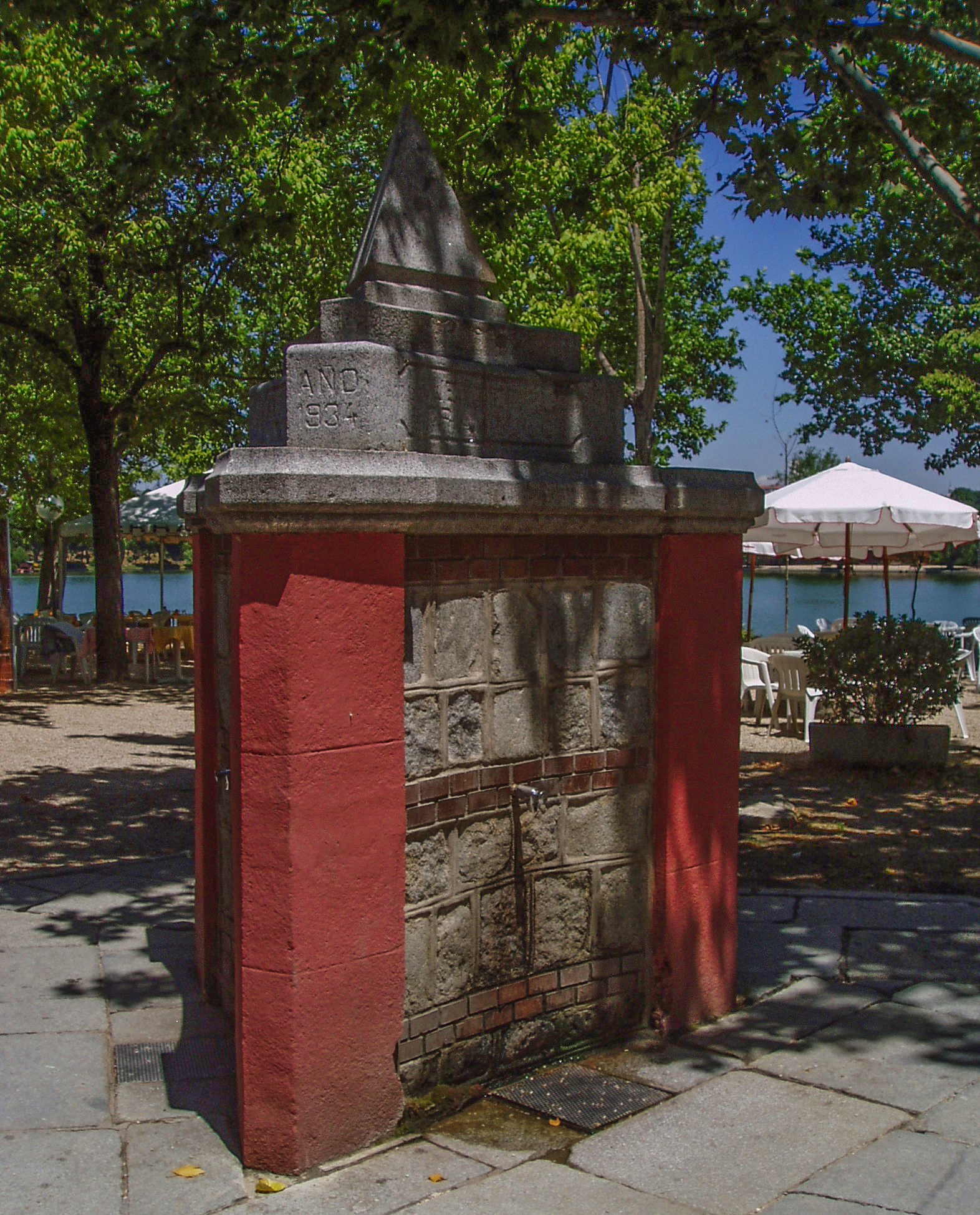 Fuente del Triángulo. Casa de Campo. Madrid. España